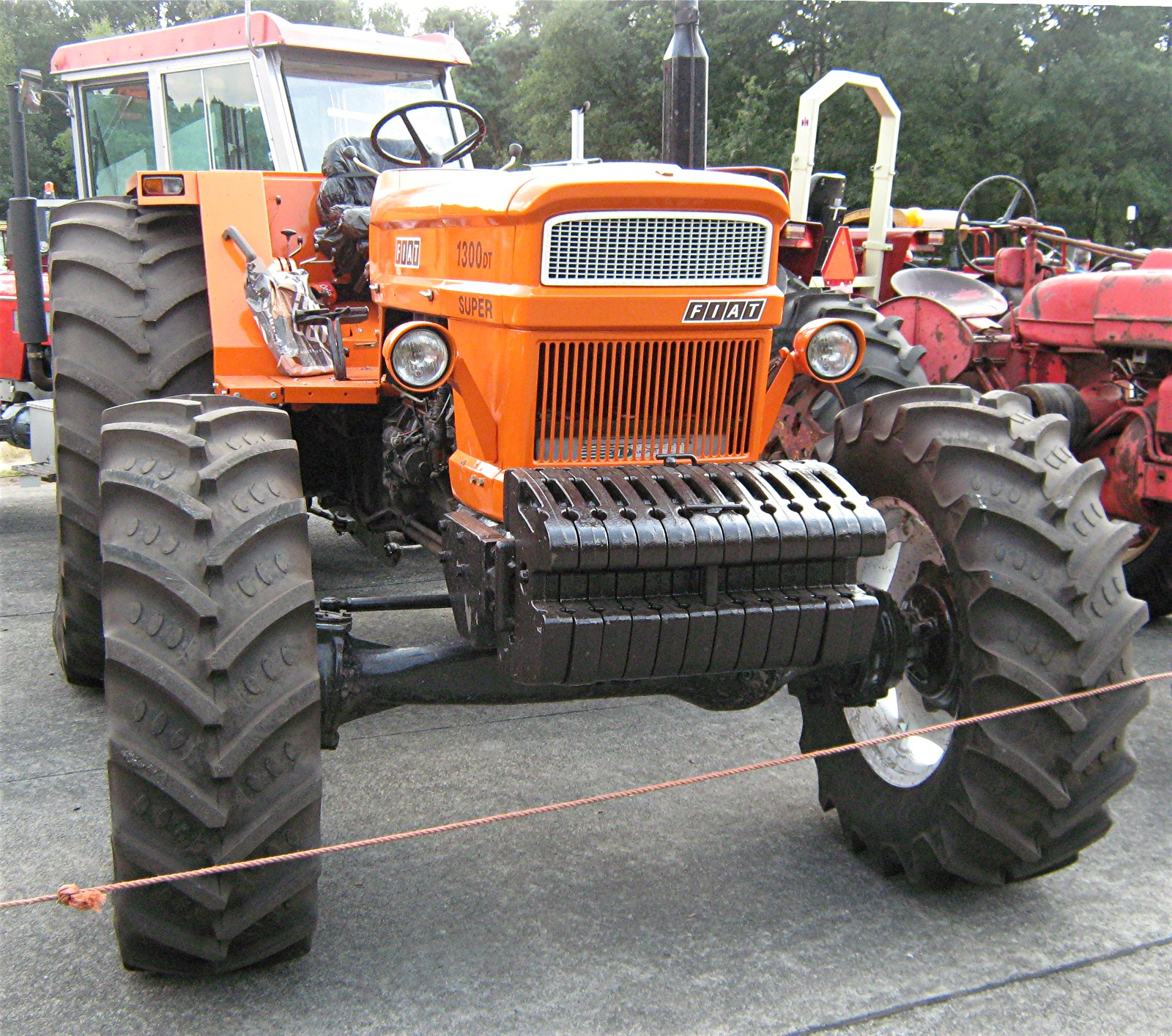 Fiat-Traktor 1300 DT Super, Vliegfeld Weelde, 21. Oldtimer-Festival des Historische Machineclubs Kempen 2009